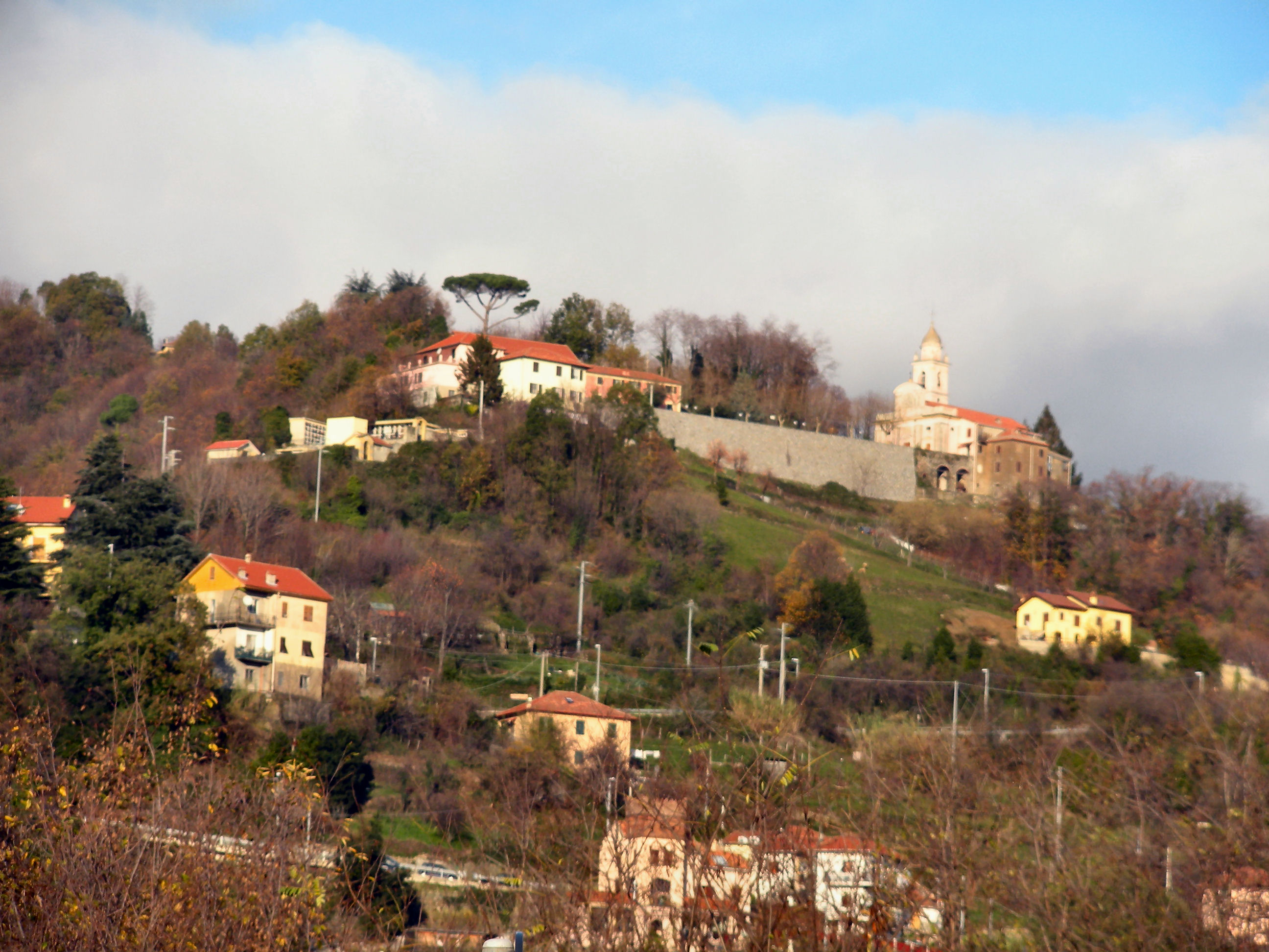 Veduta di Valleregia (Serra Riccò, Genova) Foto propria Novembre 2009 Licensing Categoria:Serra Riccò